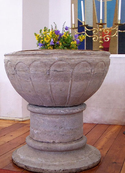 Väderstads kyrka.Dopfunten.